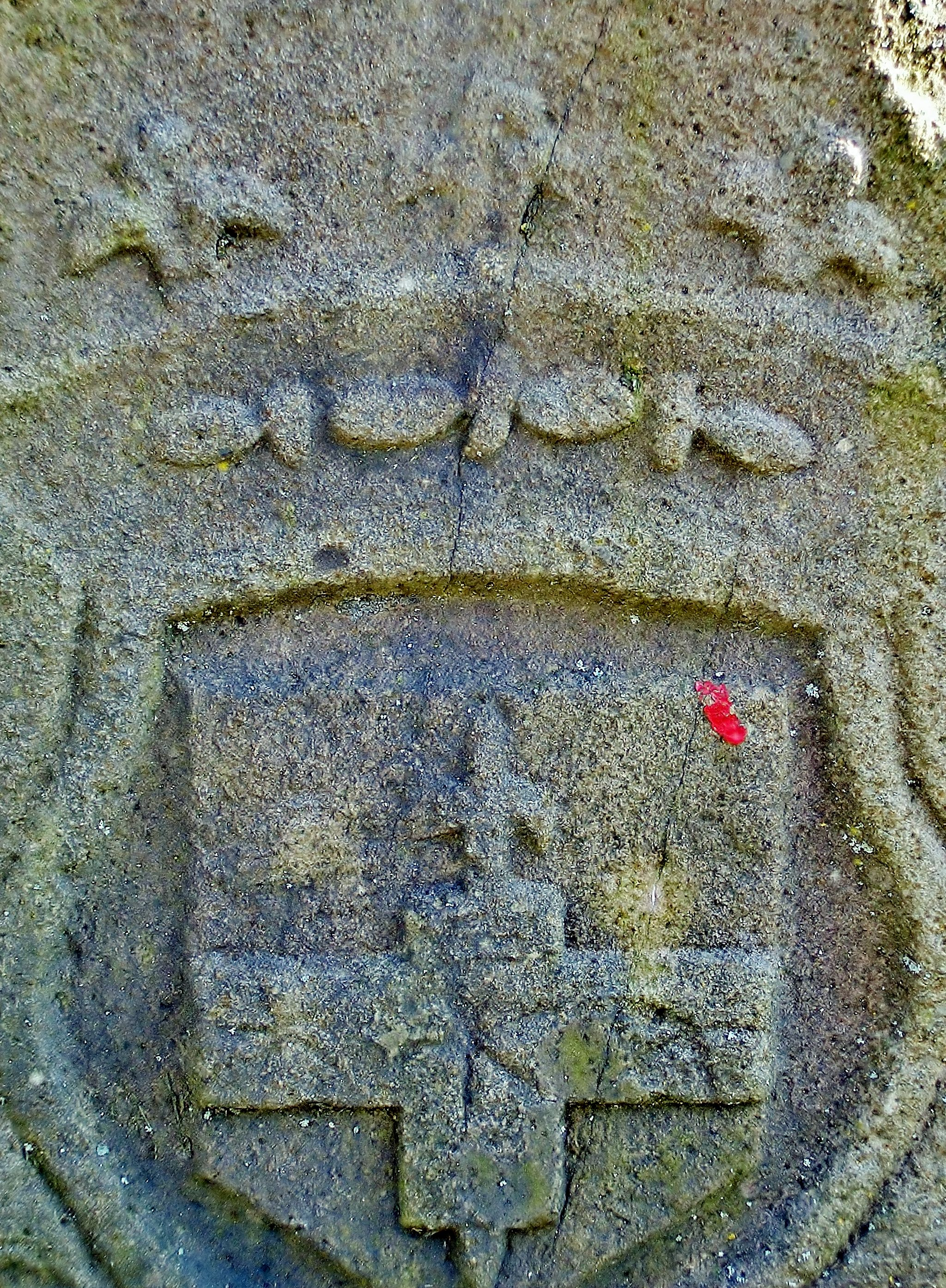 Borne armoriée près de la mairie de Novillard. Territoire de Belfort.